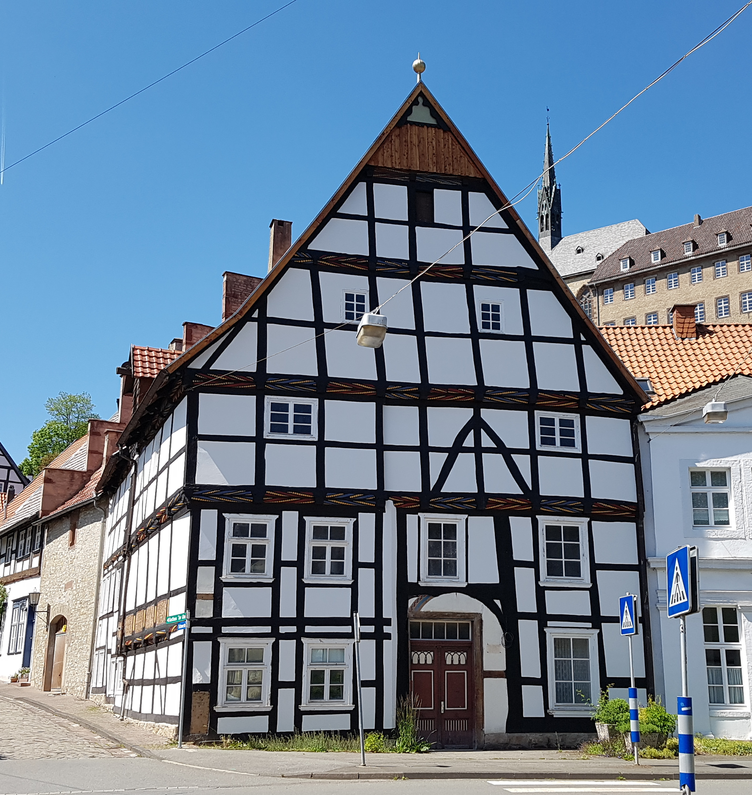 Glockengießerhaus in der Warburger Altstadt